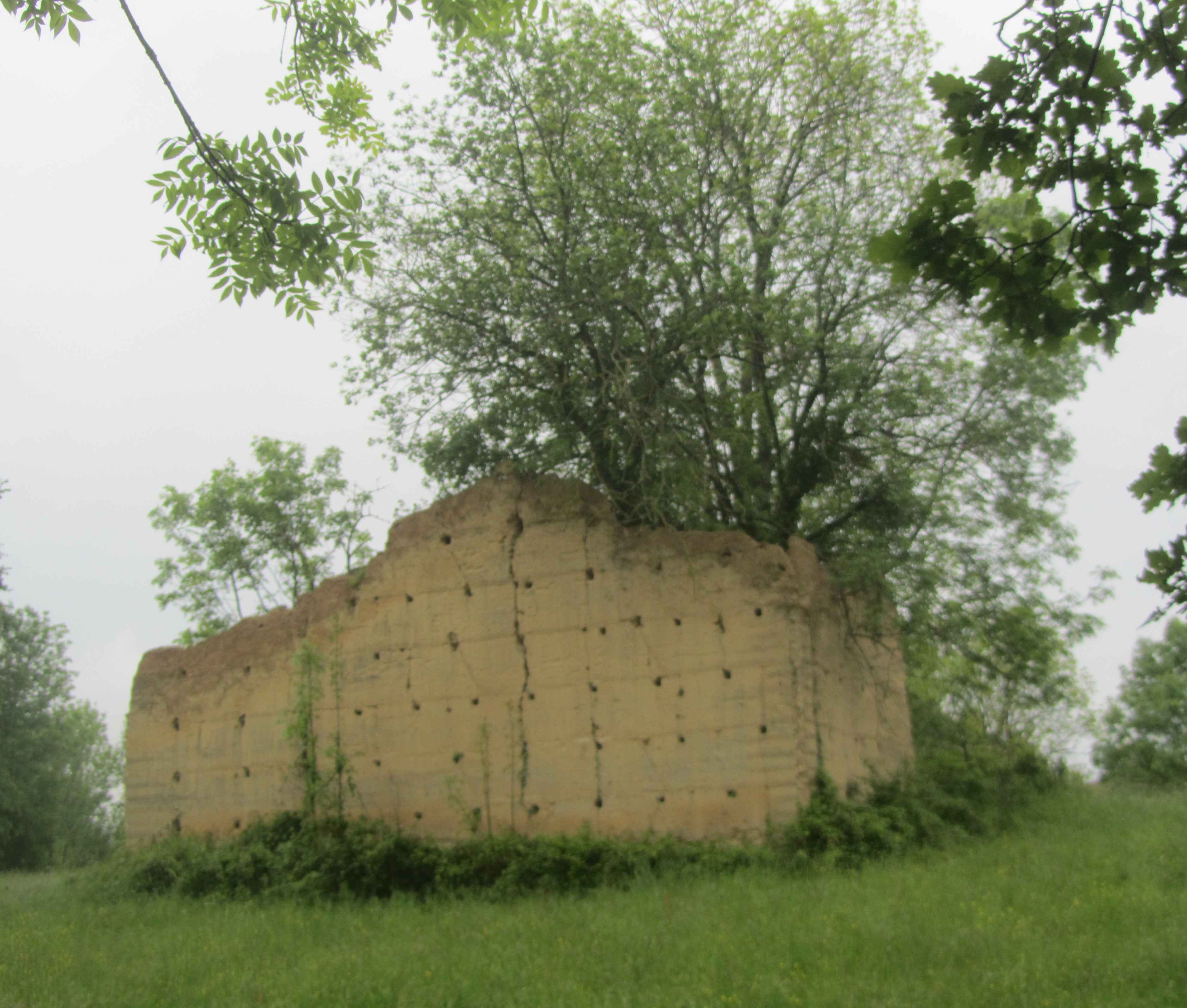 dans cette maison en ruines, les trous de boulin sont bien visibles